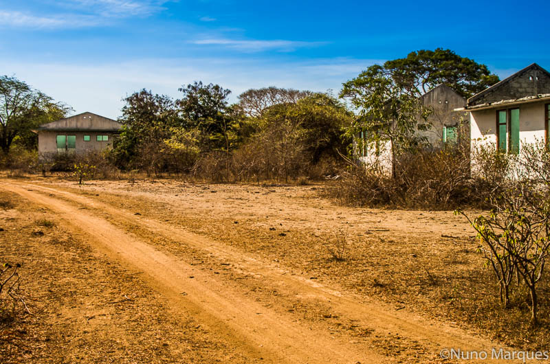 Aufgegebenes Schulgebäude aus der indonesischen Zeit, Lifau (Laleia)